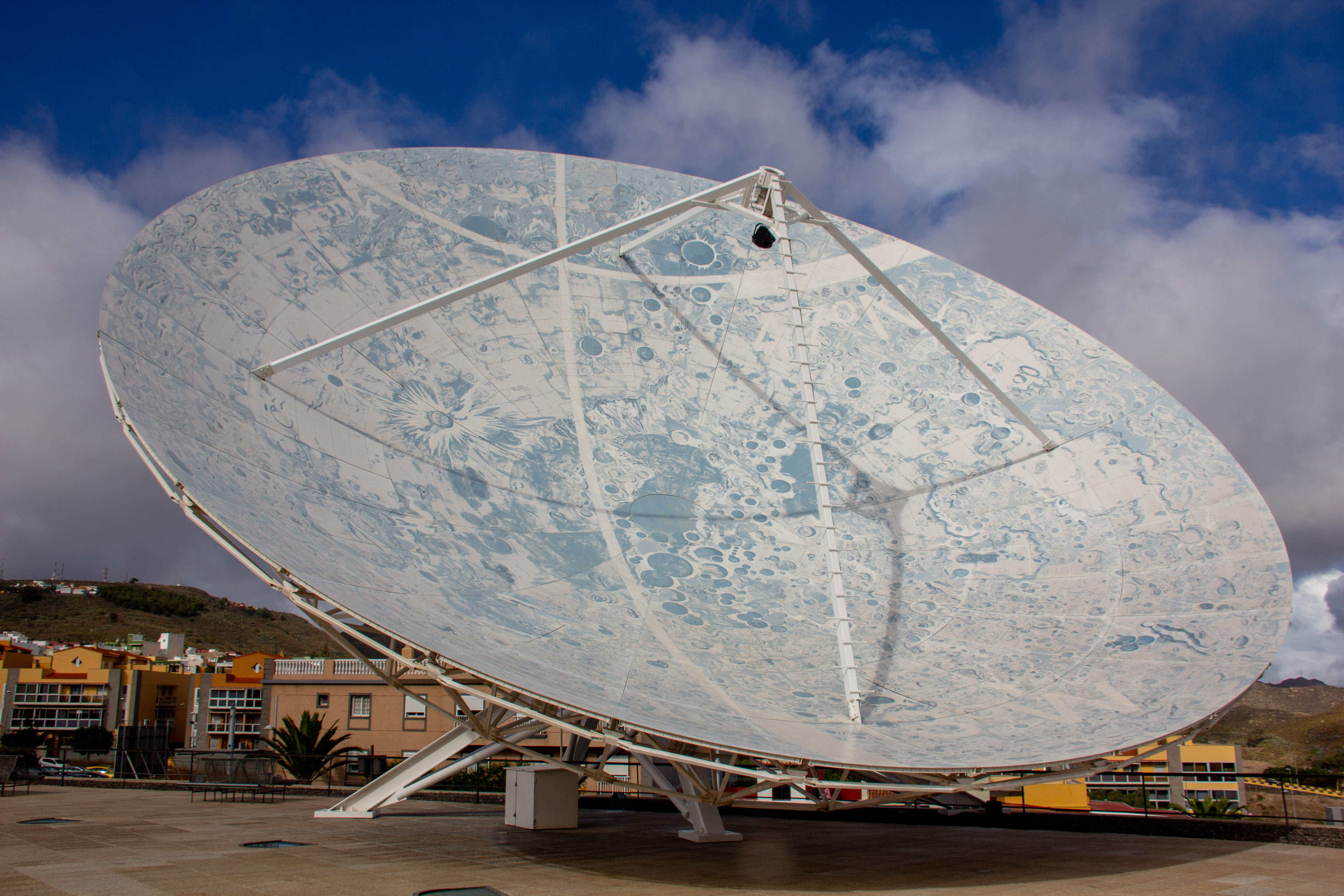 Museo de la Ciencia y el Cosmos, Tenerifel